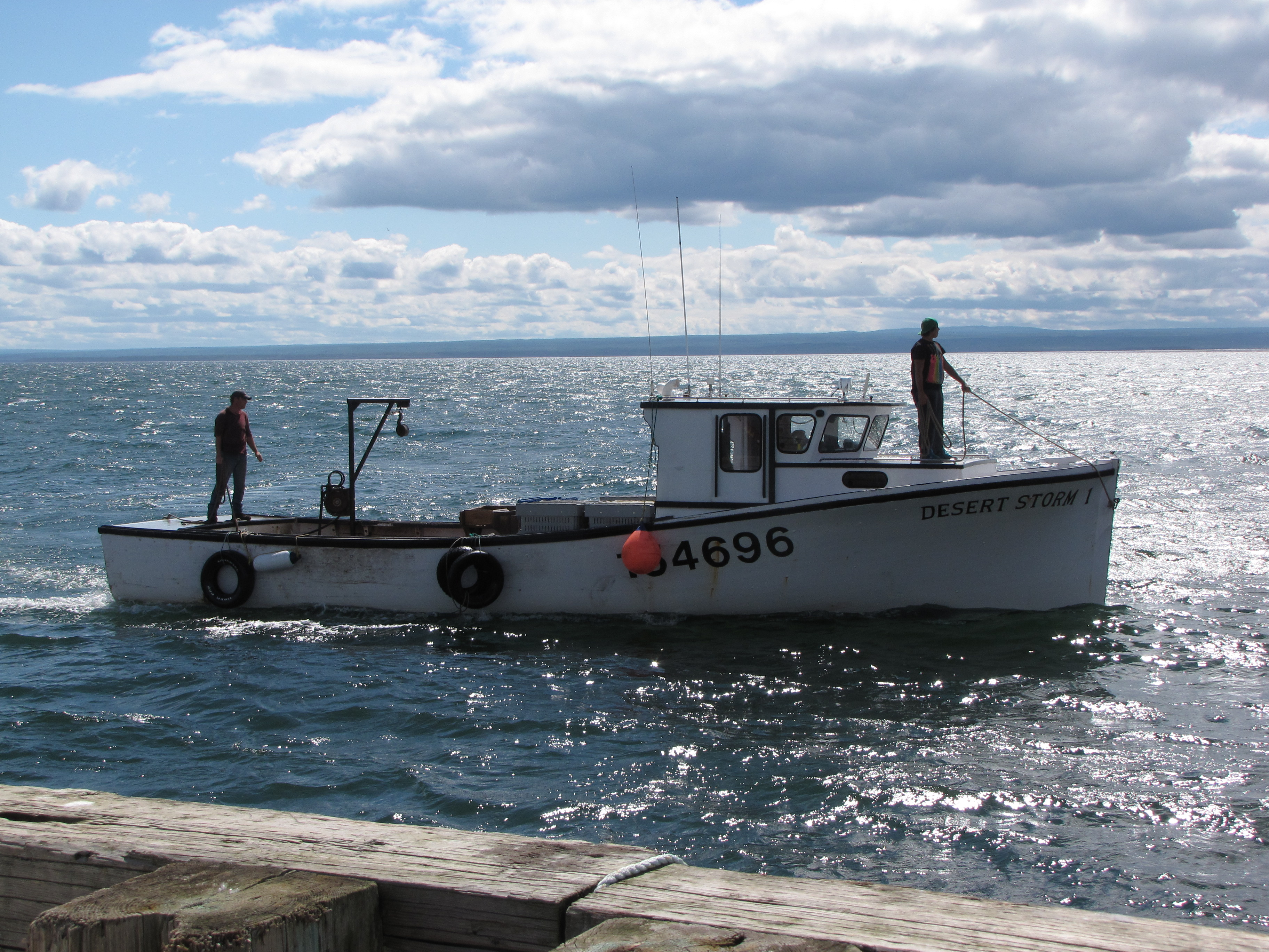 Bateau revenant de la pêche, vers le quai de Carleton-sur-Mer